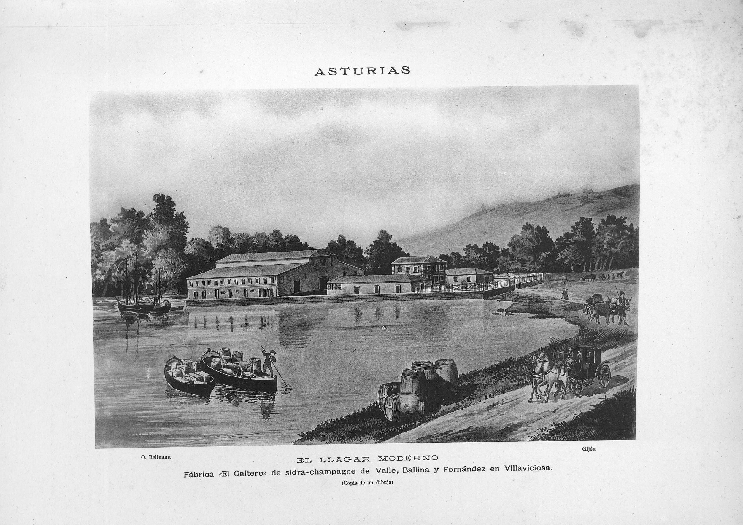 Illustración de la obra «Asturias» representando'l llagar de la Sidra El Gaitero